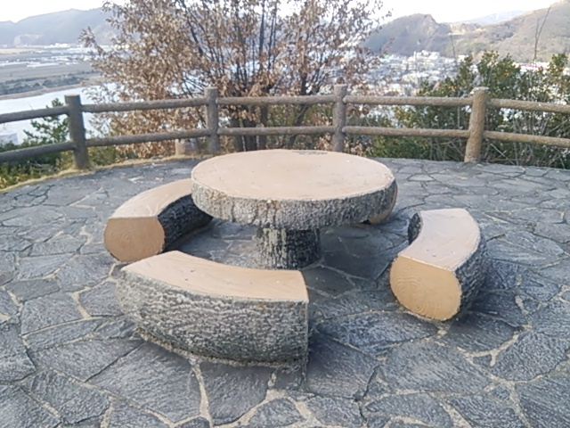 笠岡城(古城山)の山頂テラス